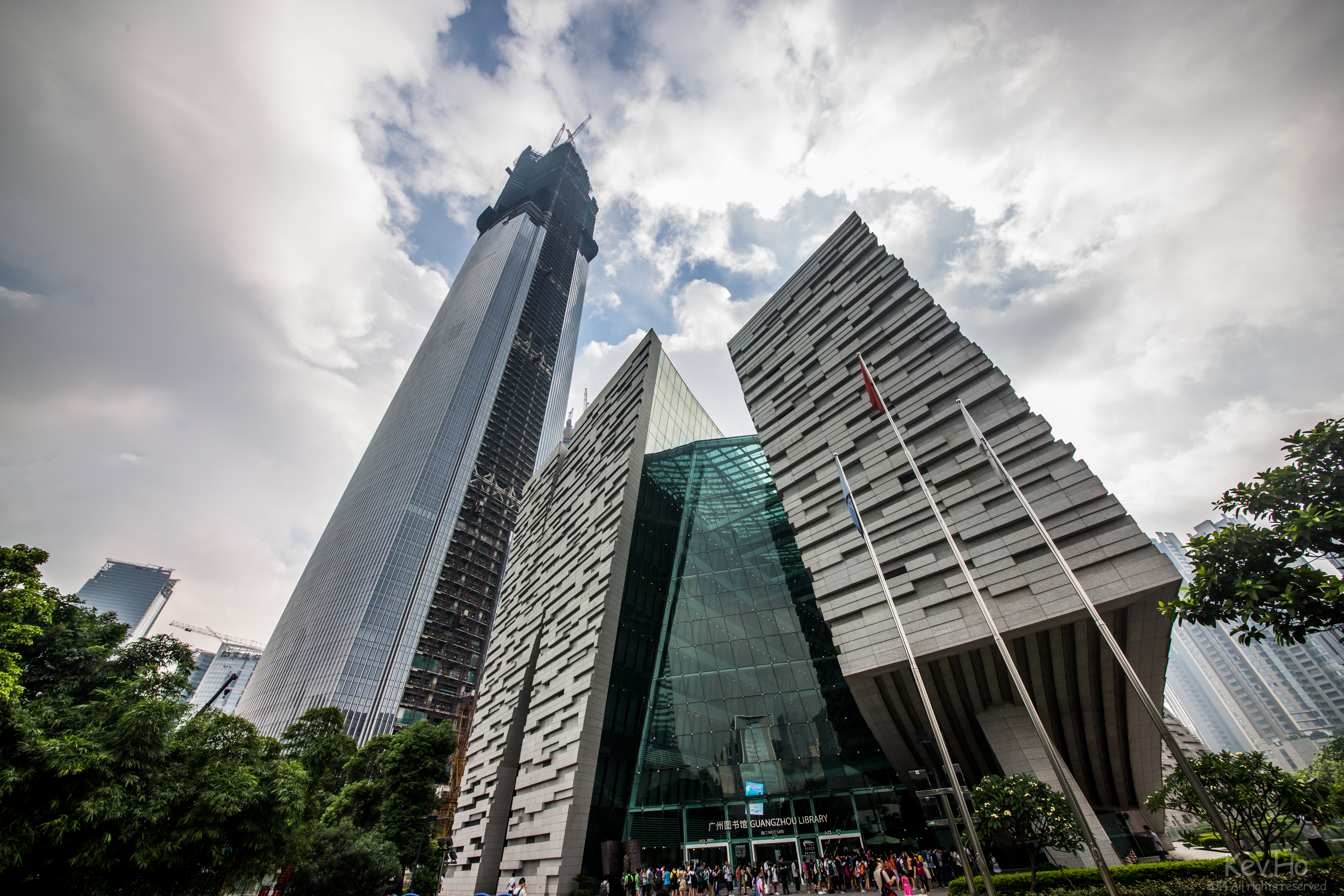 Chow Tai Fook Centre (August 2014)